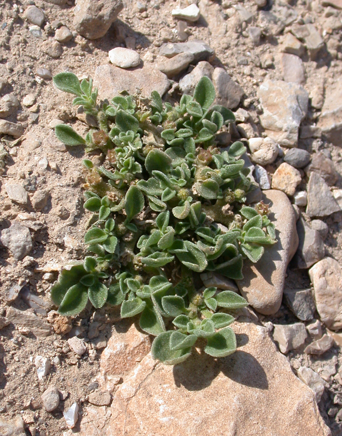 Aizoon canariense L. (חיעד קנרי), Judean Desert, Israel, December 8, 2006.